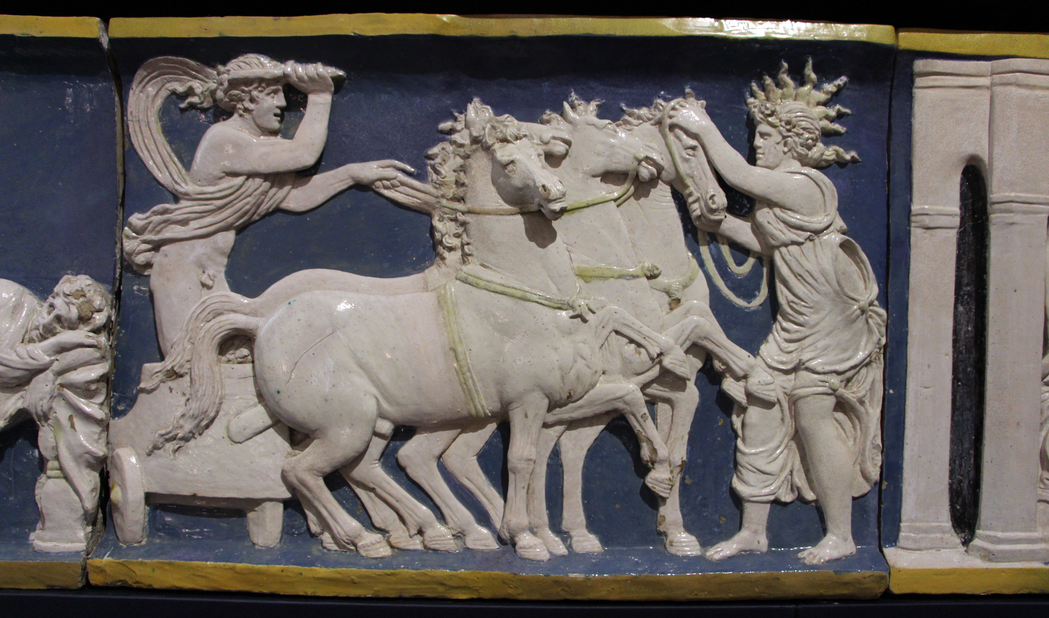 Villa medicea di Poggio a Caiano - MIBAC The making of this document was supported by Wikimedia CH. (Submit your project!) For all the files concerned, please see the category Supported by Wikimedia CH. This is a photo of a monument which is part of cultural heritage of Italy.